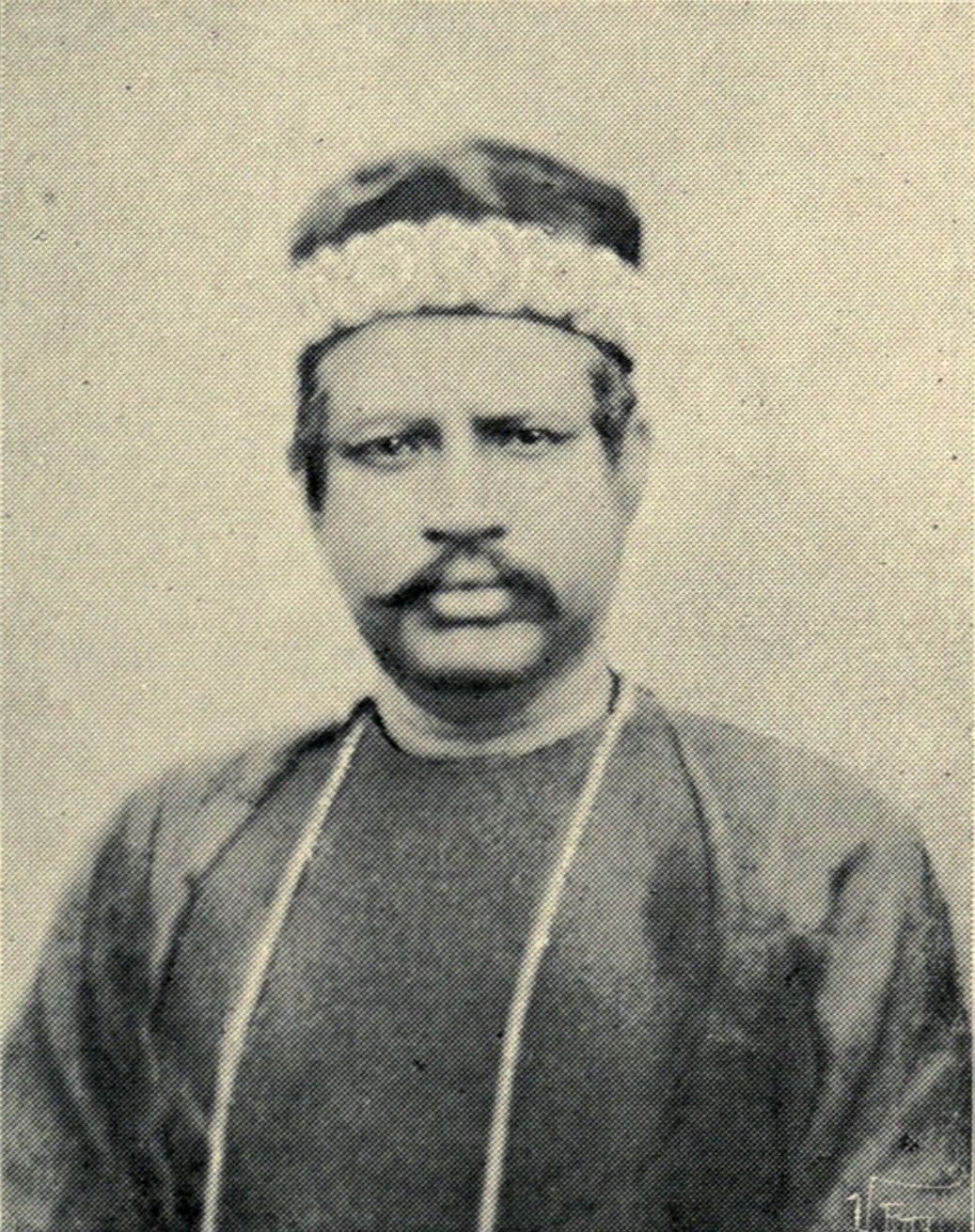 Dinobandhu Mitra.jpg